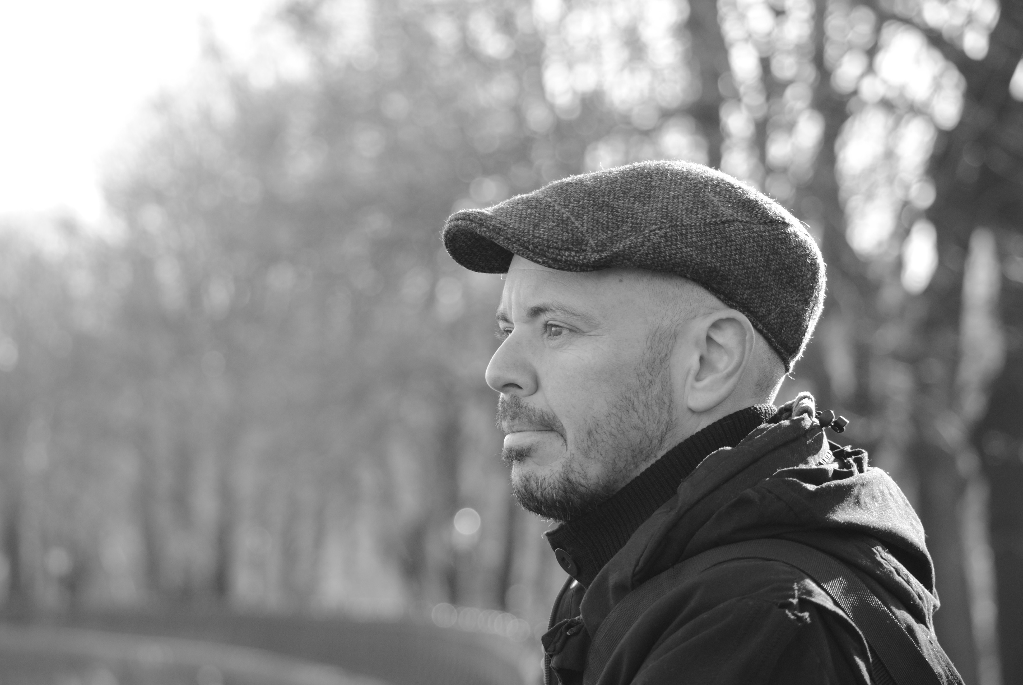 Foto di Fabio Geda, New York, Central Park, 2012